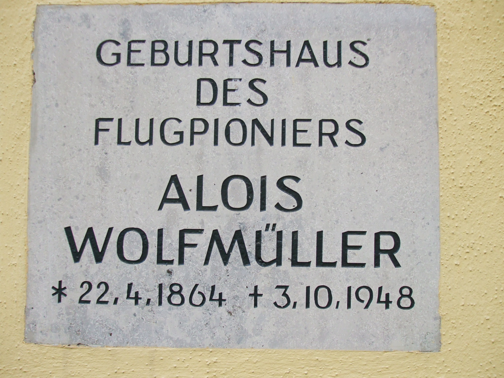 Gedenktafel an Alois Wolfmüller in der Herzog-Ernst-Straße in Landsberg am Lech. Alois Wolfmüller (* 24. April 1864 in Landsberg am Lech; † 3. Oktober 1948 in Oberstdorf) war deutscher Erfinder, Ingenieur und Flugtechniker.